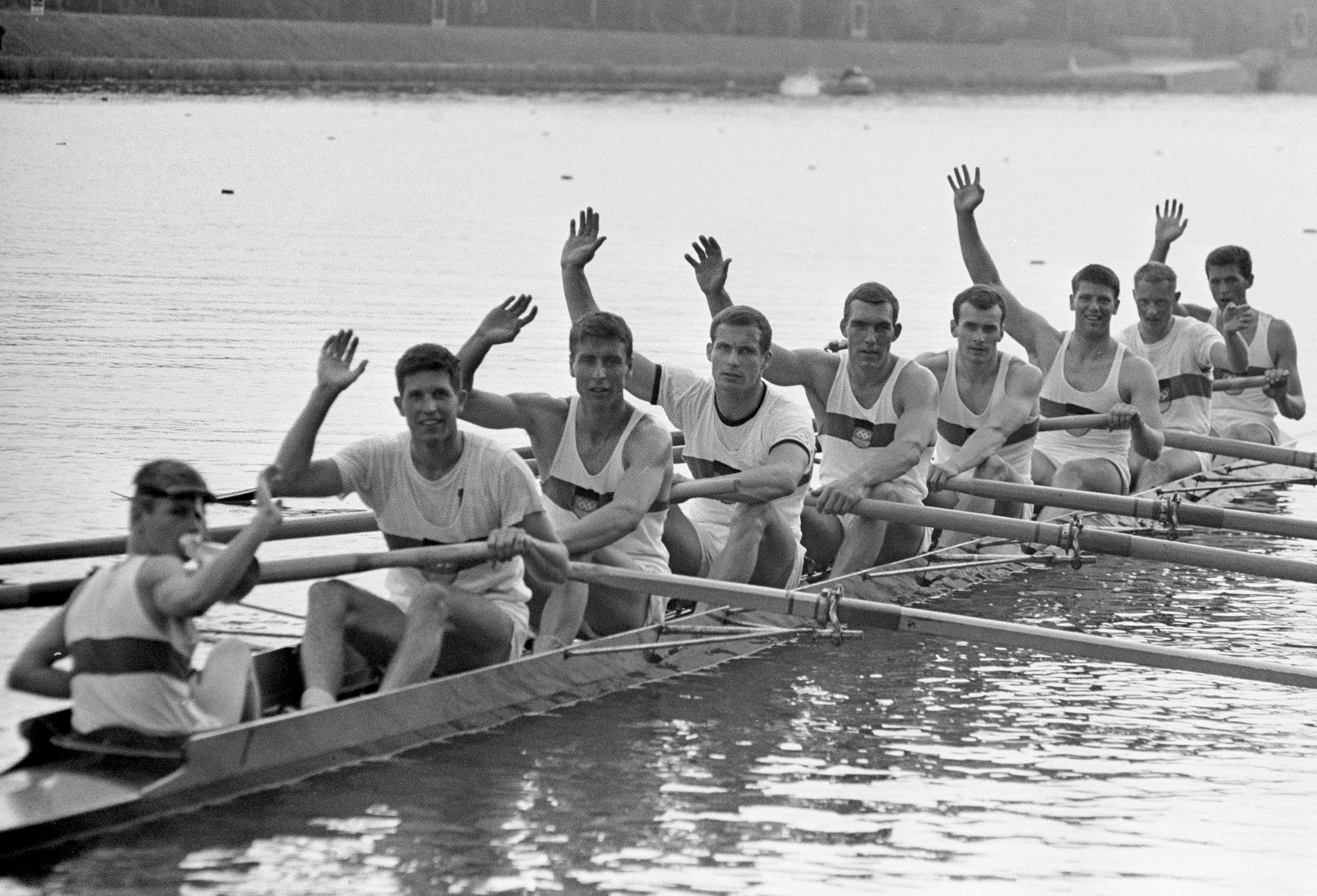 Europese roeikampioenschappen Bosbaan, Duitse acht. ID (van rechts naar links): Horst Meyer, Jürgen Plagemann, Jürgen Schröder, Klaus Behrens, Hans-Jürgen Wallbrecht, Karl-Heinrich von Groddeck, Klaus Bittner, Klaus Aeffke en Thomas Ahrens